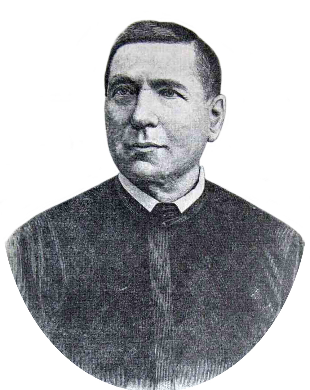 Український чернець-василіянин, провінціял ЧСВВ, освітянин, книголюб о. Іриней Яворський.